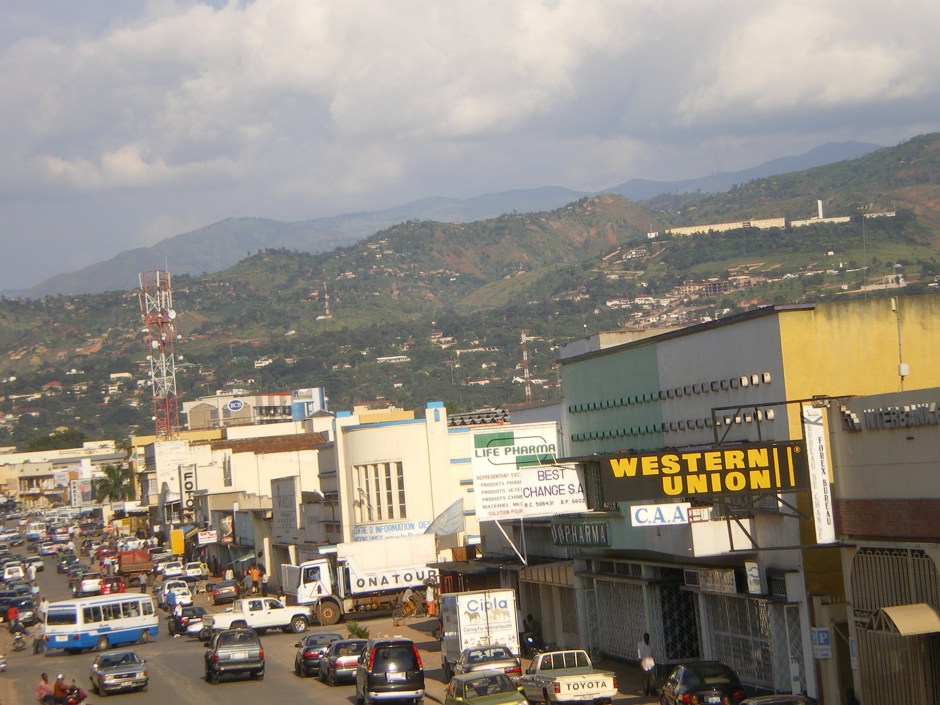 Бужумбура